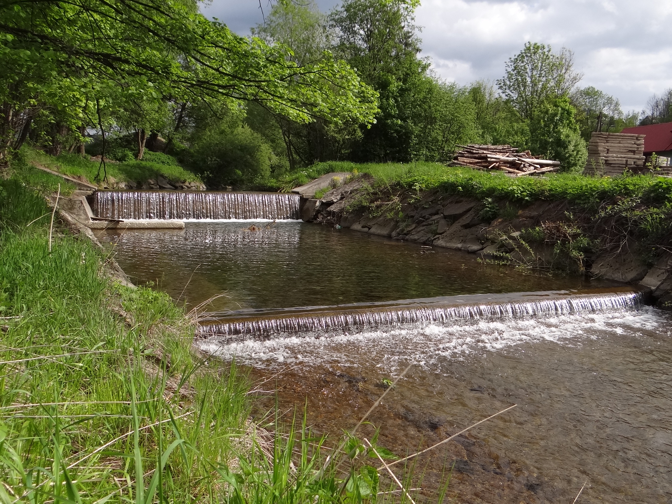 Syhlec w Zubrzycy Gornej